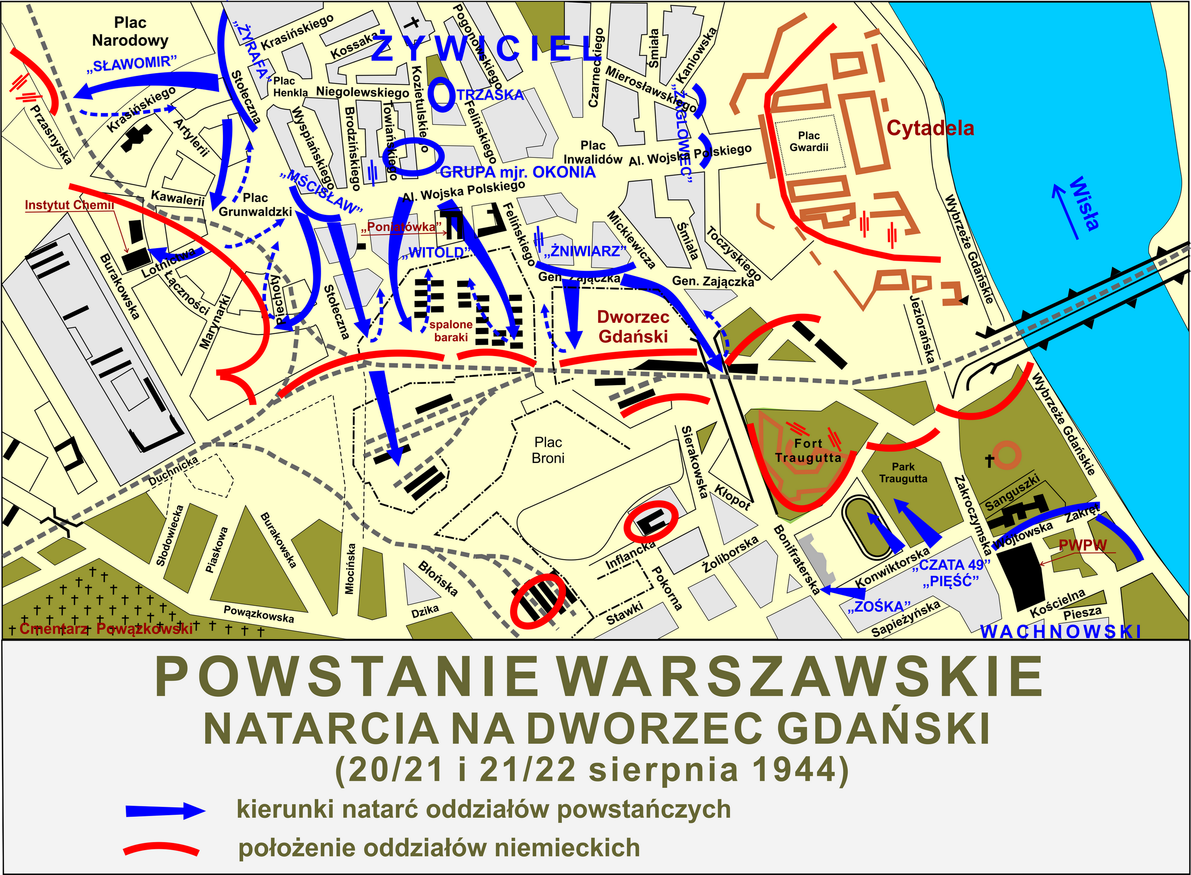 Powstanie Warszawskie 1944 - Powstańcze natarcie na Dworzec Gdański